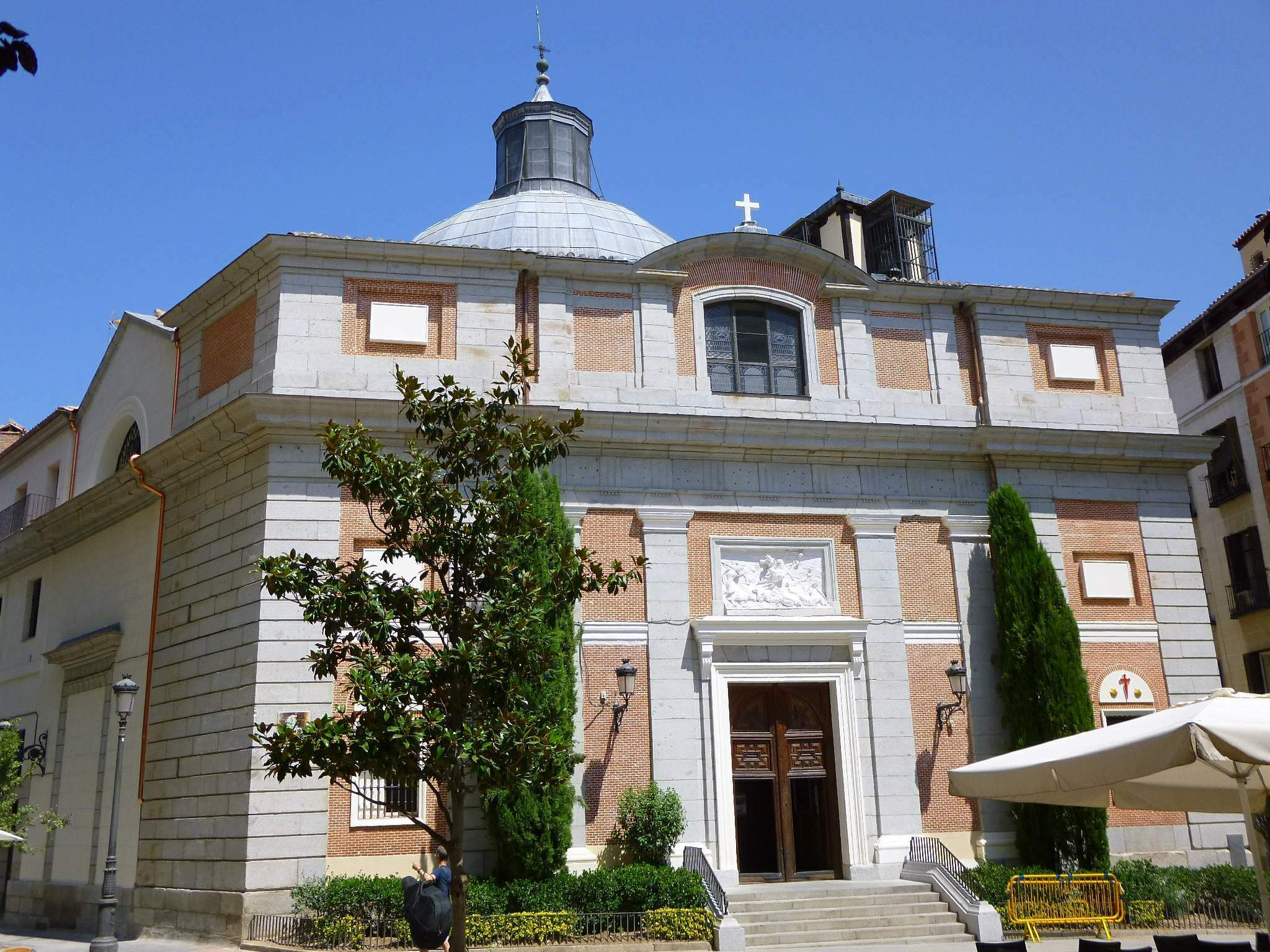 Iglesia de Santiago y San Juan Bautista (Madrid)